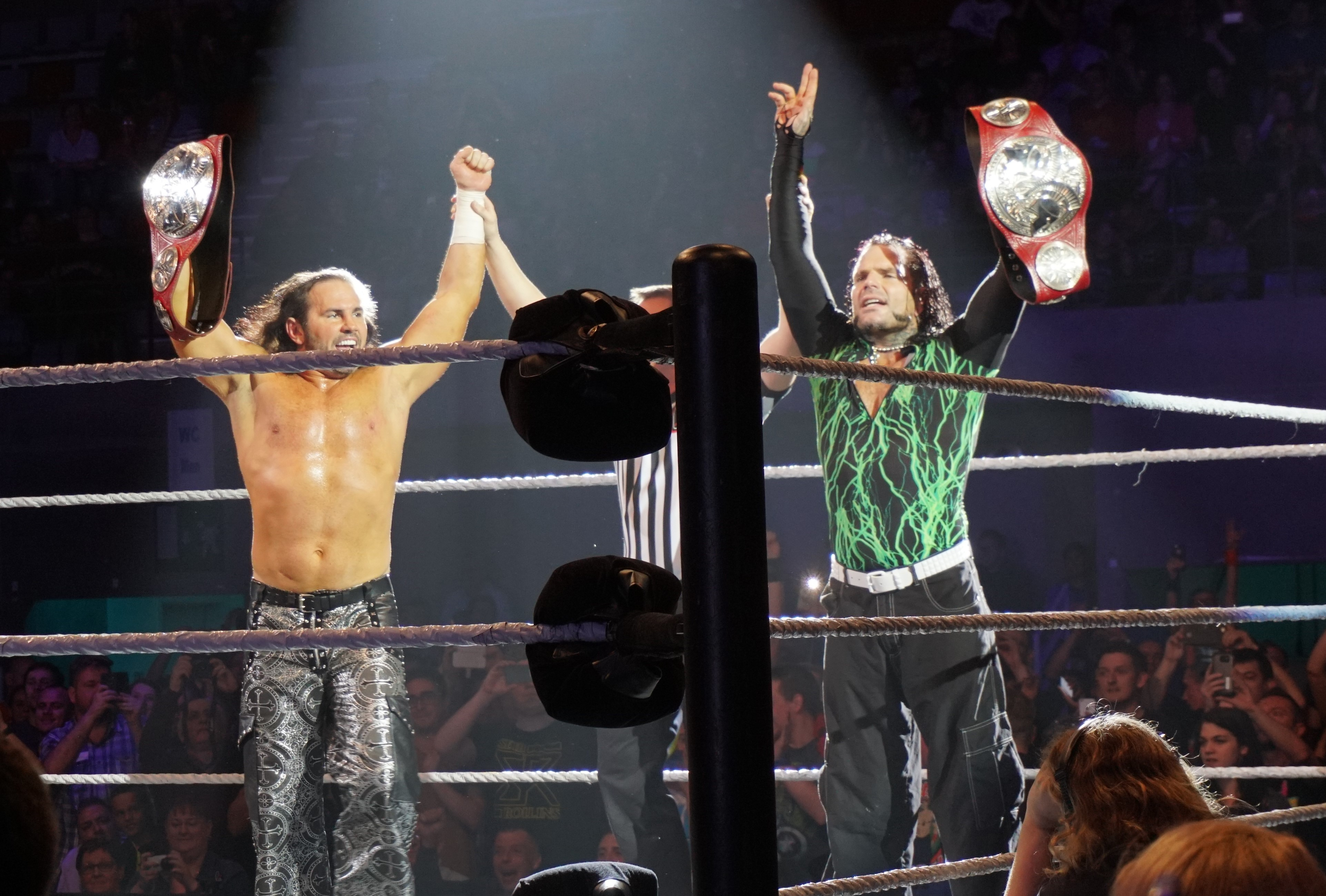 Jeff Hardy (c) & Matt Hardy (c) defeat Big Cass & Enzo Amore, Cesaro & Sheamus (in Triple Threat Match) Info on the match : WWE RAW Tag Team Title ( Le vendredi 12 mai, la WWE Live Tour fera escale au Country Hall a Liege pour le spectacle de catch de l'annee! Au programme: des duels impitoyables et des rencontres captivantes entre les meilleures equipes et les plus grands rivaux. )